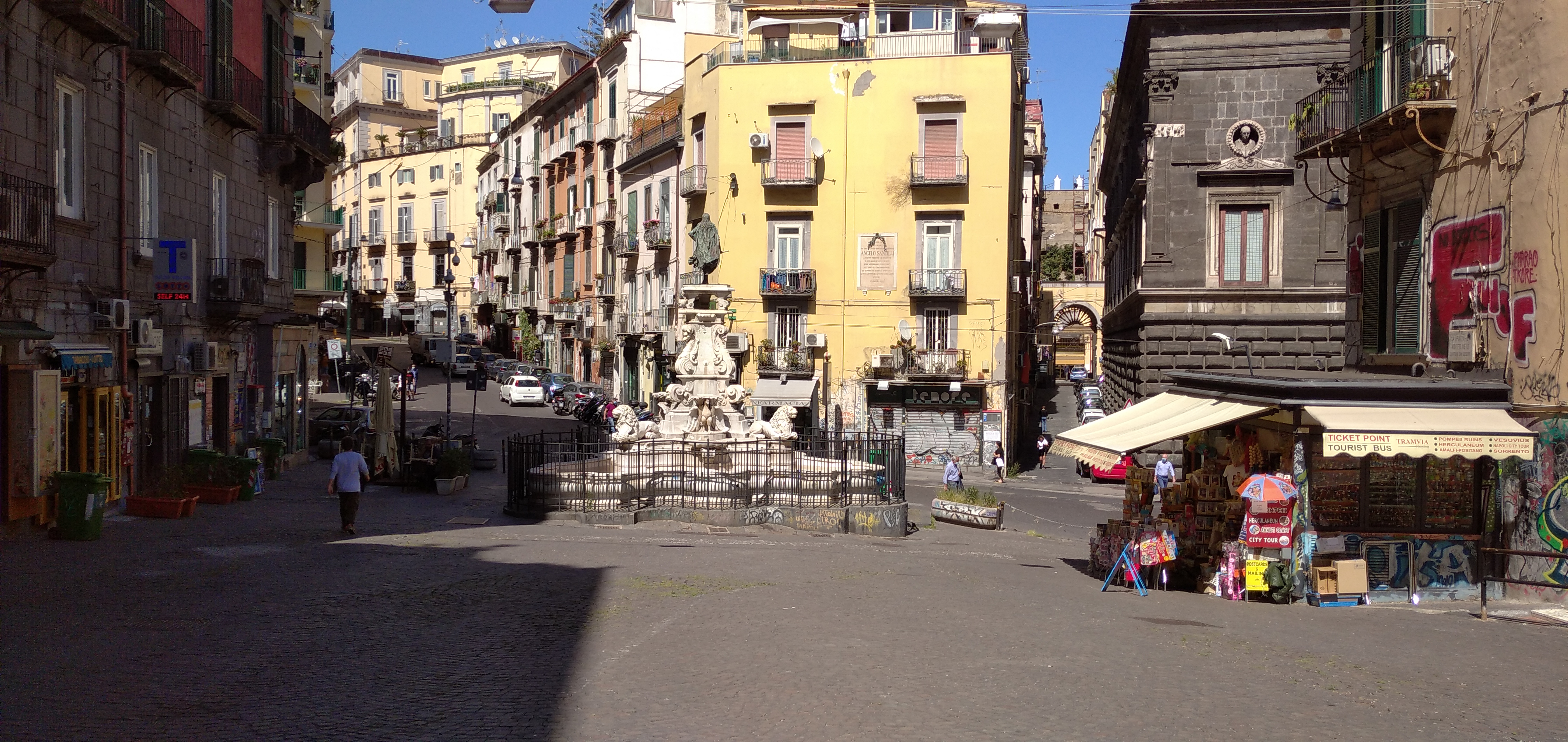 Fontana di re Carluccio, Napoli.